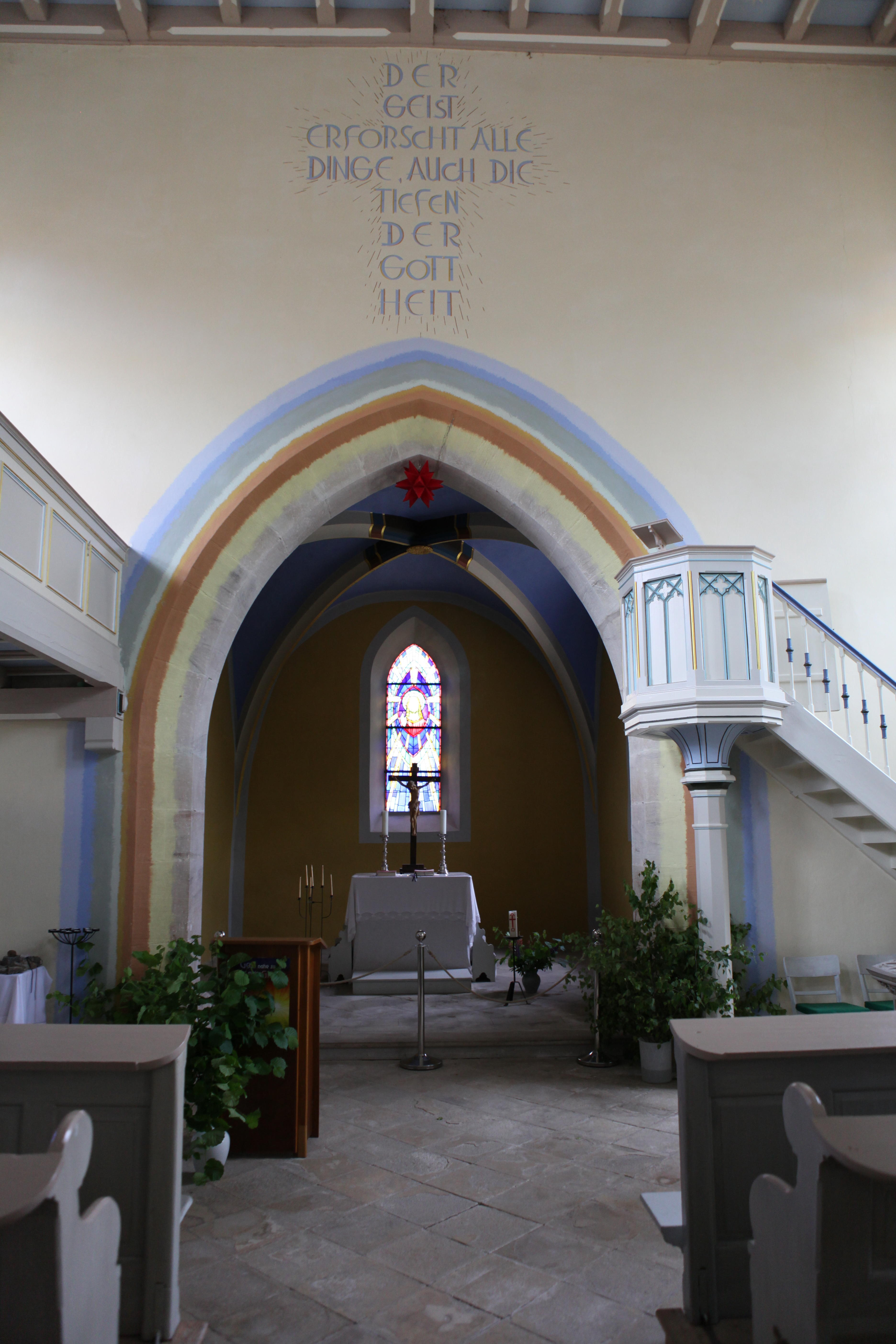 Evangelisch-lutherisch Kirche St. Wigbert in Häselrieth, OT von Hildburghausen